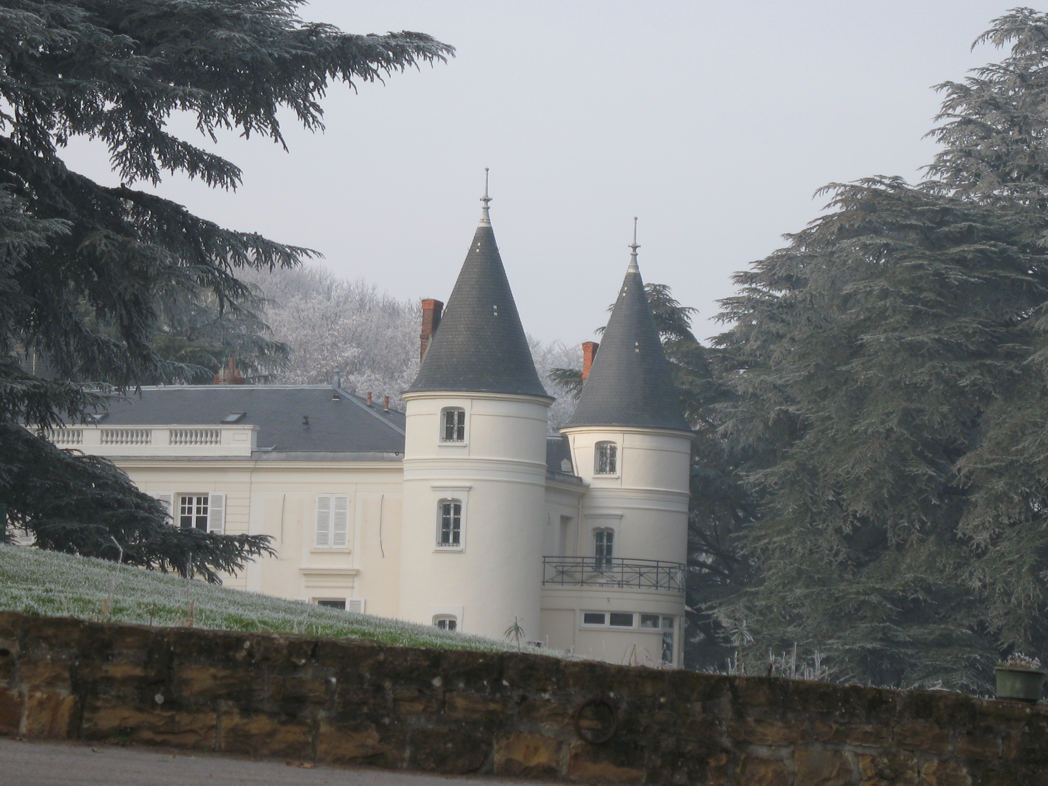 château de Tourvéon - Collonges-au-Mont-d'Or (Rhône)